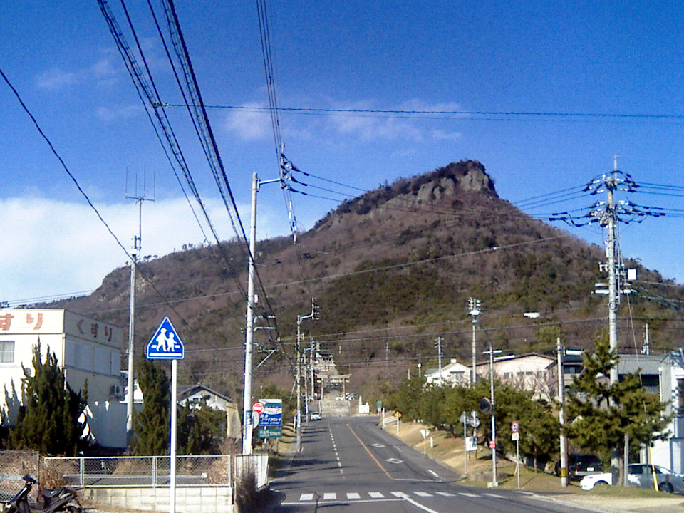 屋島。南側（屋島ドライブウェイに続く道路）から撮影。 - 日本国香川県高松市。